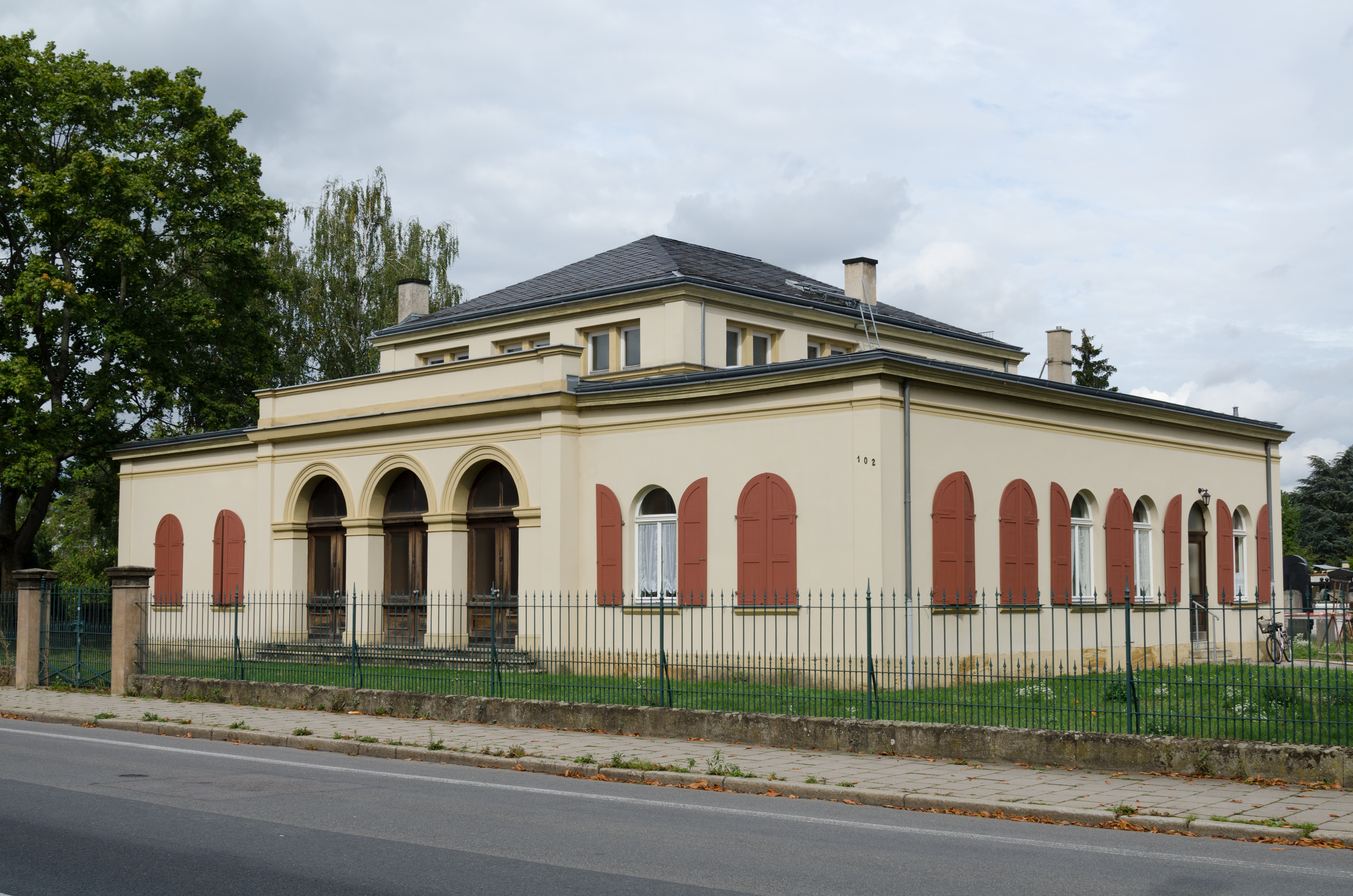 Bamberg, Siechenstraße 102, von Südosten